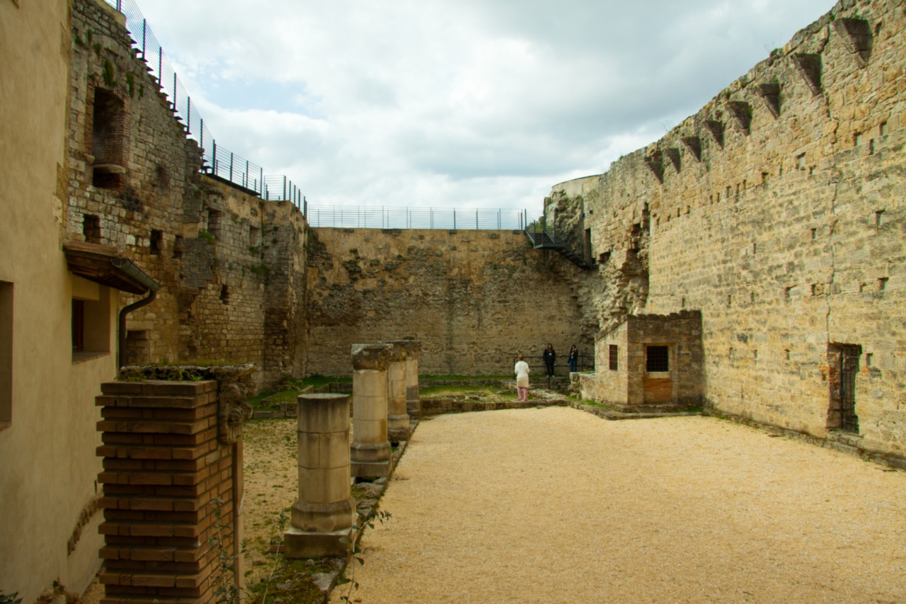 Interno del Castello di Staggia Senese